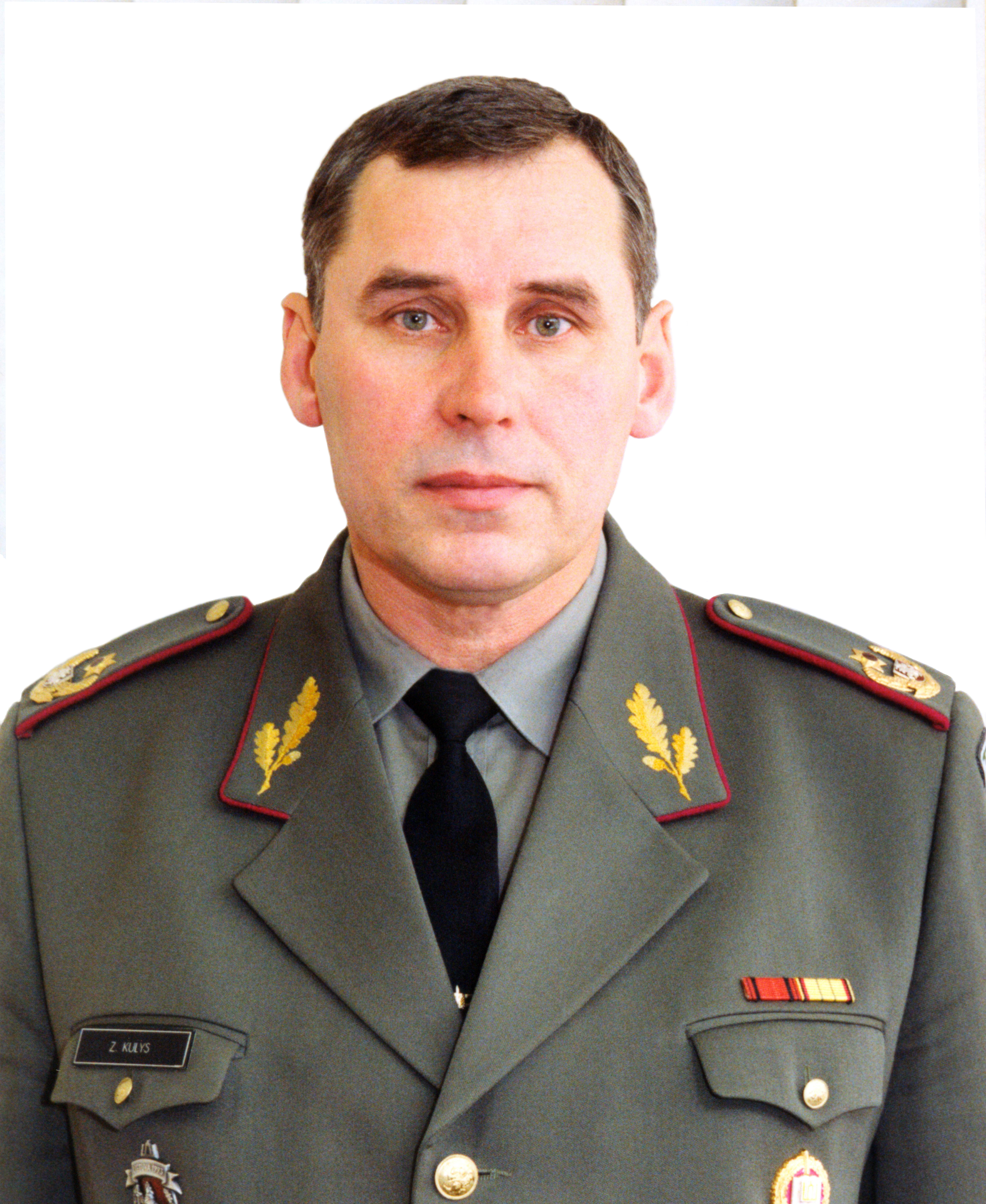 Zenonas Kulys (g. 1947 m. gegužės 4 d. Biržai) – Lietuvos karinis veikėjas, brigados generolas, technikos mokslų daktaras, pirmasis Lietuvos karo akademijos rektorius.